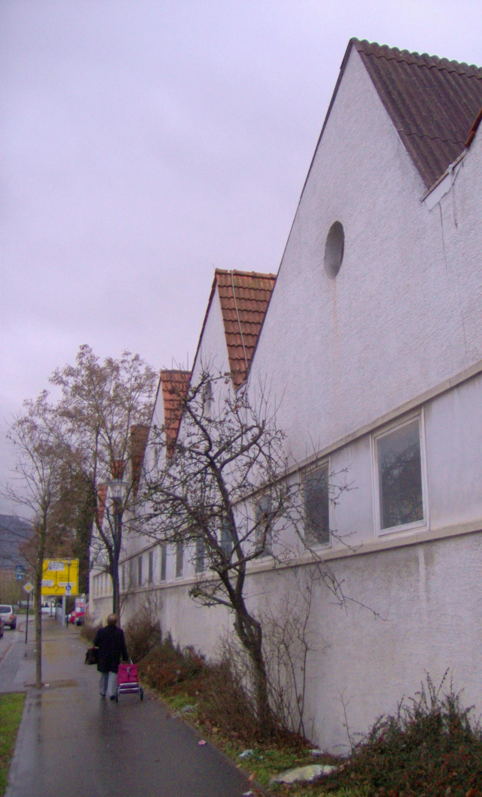 Sheetdachtrakt der Pausa-AG des jahrelangen Mössinger Wirtschaftsmotors.